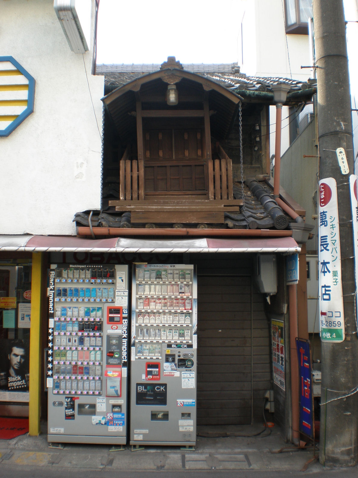 愛知県小牧市の商店の屋根の上に設置された屋根神（やねがみ）の祠。